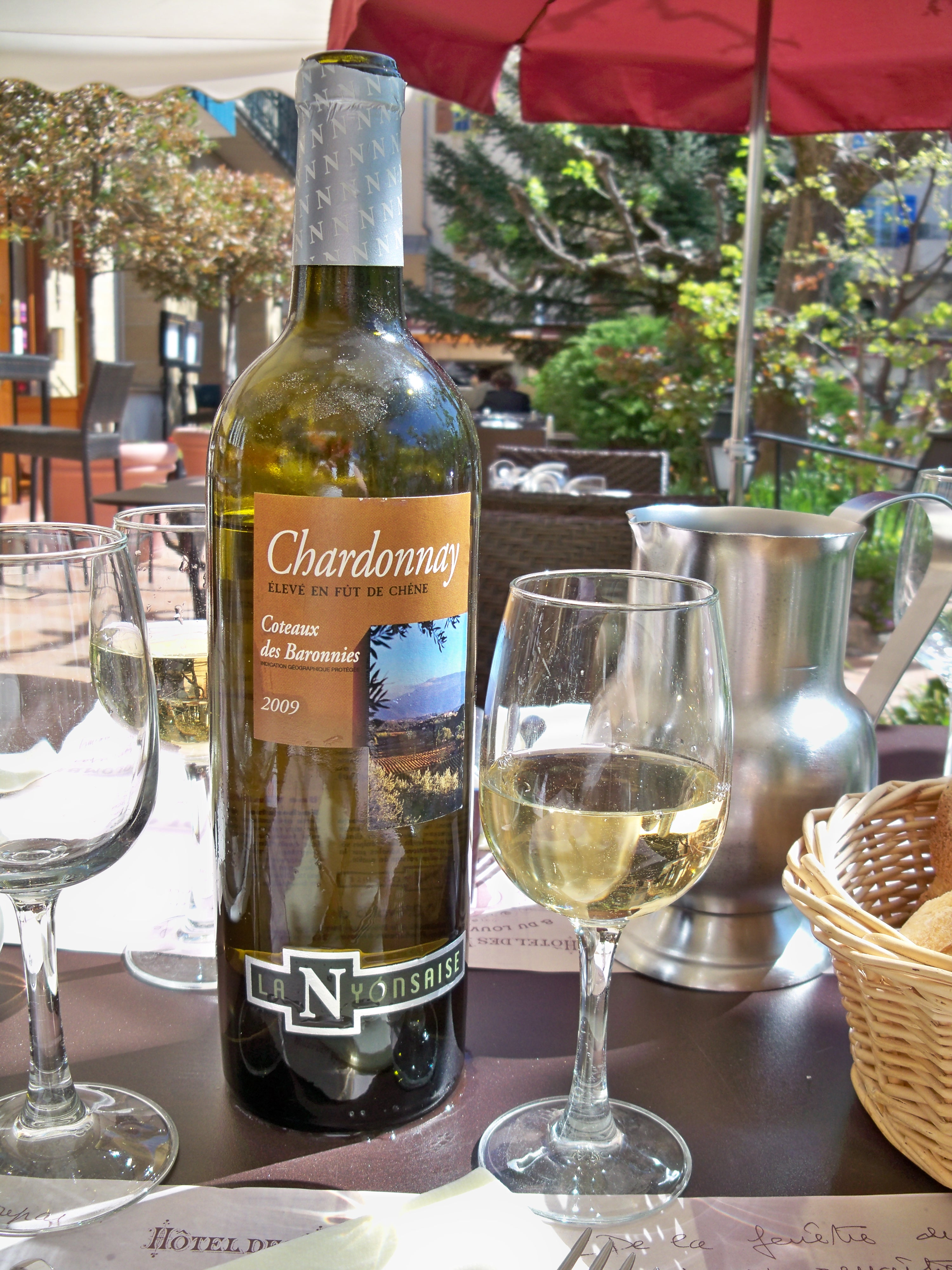 Bouteille de Coteaux des Baronnies blanc